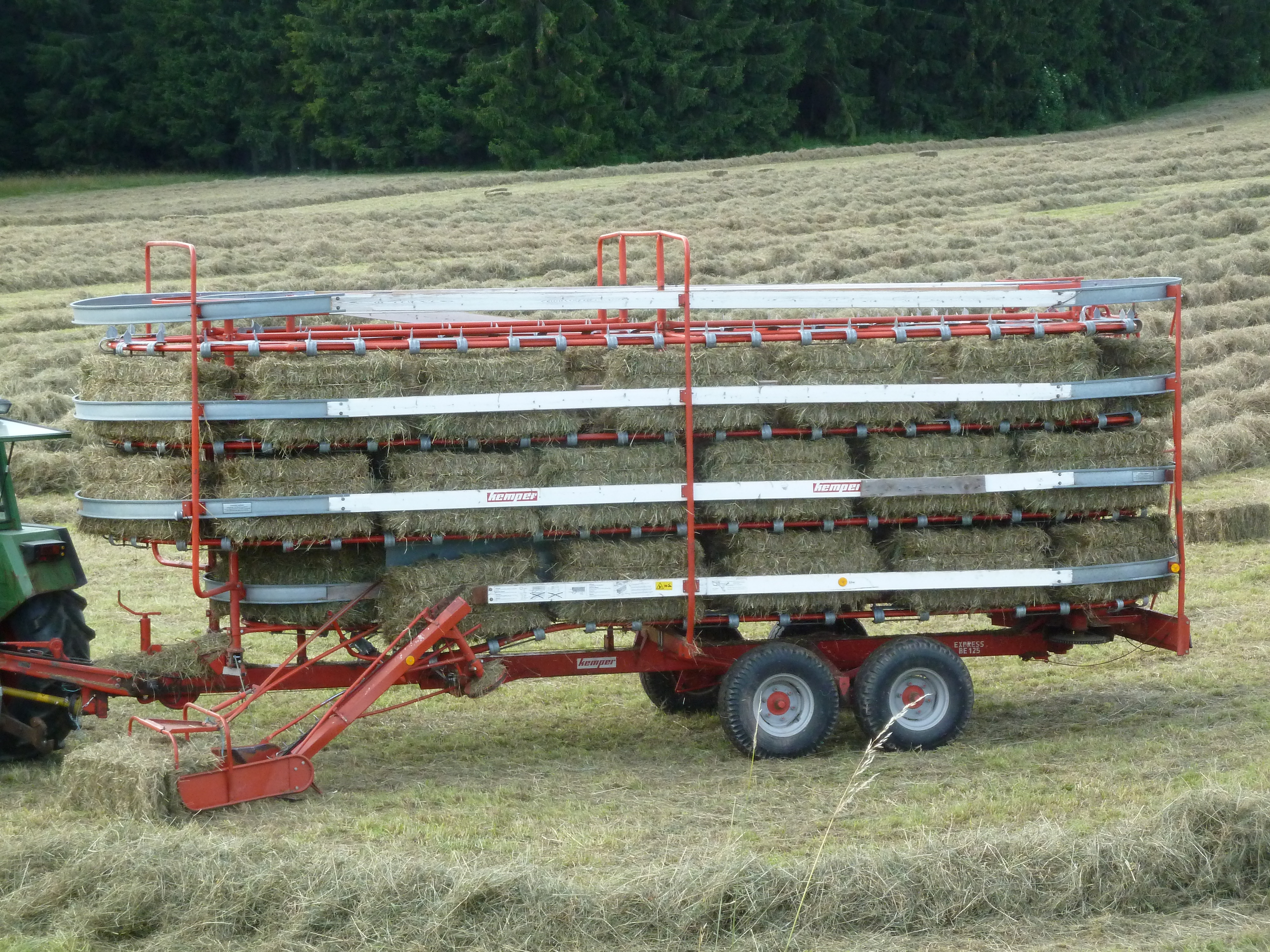 Ballensammelwagen von Kemper im Einsatz